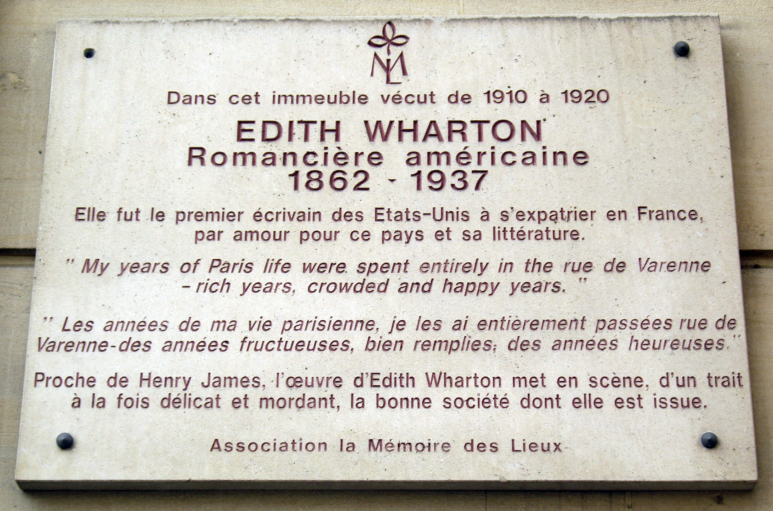 Plaque apposée au n° 53 de la rue de Varenne, Paris 7e, où habita la romancière Edith Wharton (1862-1937) de 1910 à 1920.